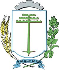 Brasão de armas do Município de Irati, Estado do Paraná, retirado do site da Prefeitura Municipal de Irati (